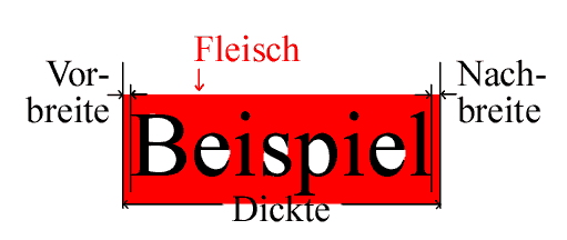 Fleisch (Typografie), Christian Pfeiffer, selbst erstellt Dickte: Eigentlich hat nicht das ganze Wort (hier »Beispiel«), sondern der einzelne Buchstabe eine Dickte. Vielleicht sollte man die Grafik mal präzisieren.